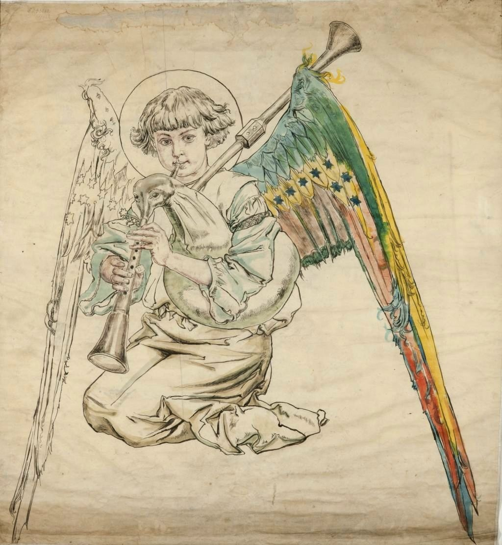 Anioł grający na dudach, projekt do polichromii w kościele Mariackim, akwarela na papierze, 137 x 125 cm, Dom Jana Matejki w Krakowie